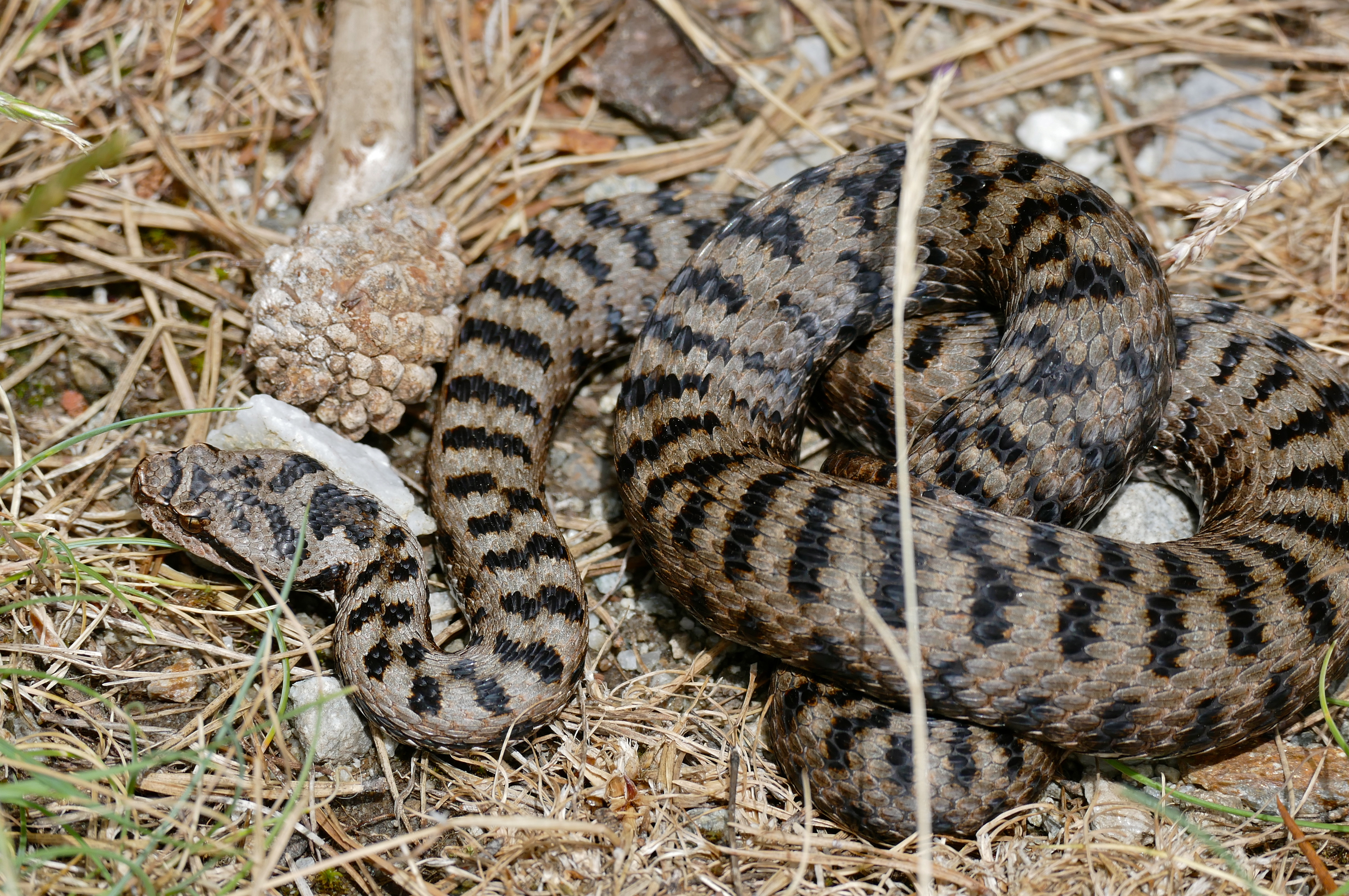 Le Boréon, St-Martin-Vésubie, Alpes-Maritimes, FRANCE